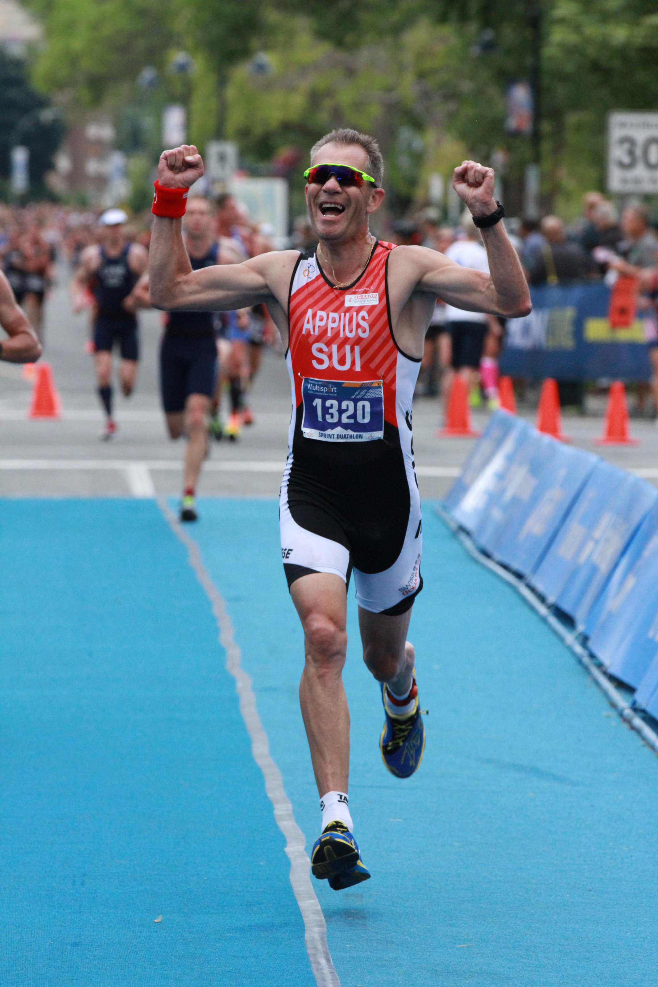 Penticton, Kanada